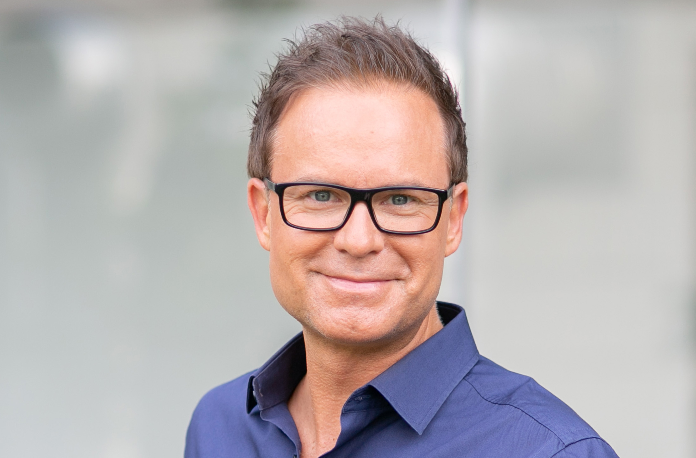 Foto von Mentalexperte Manuel Horeth